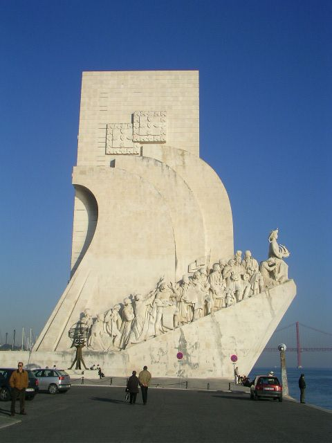 発見のモニュメント.